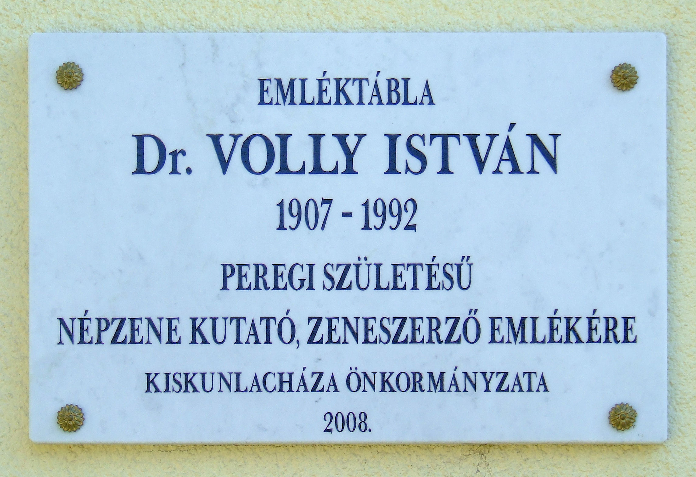 Volly István népzenekutató, zeneszerző emléktáblája Kiskunlacházán